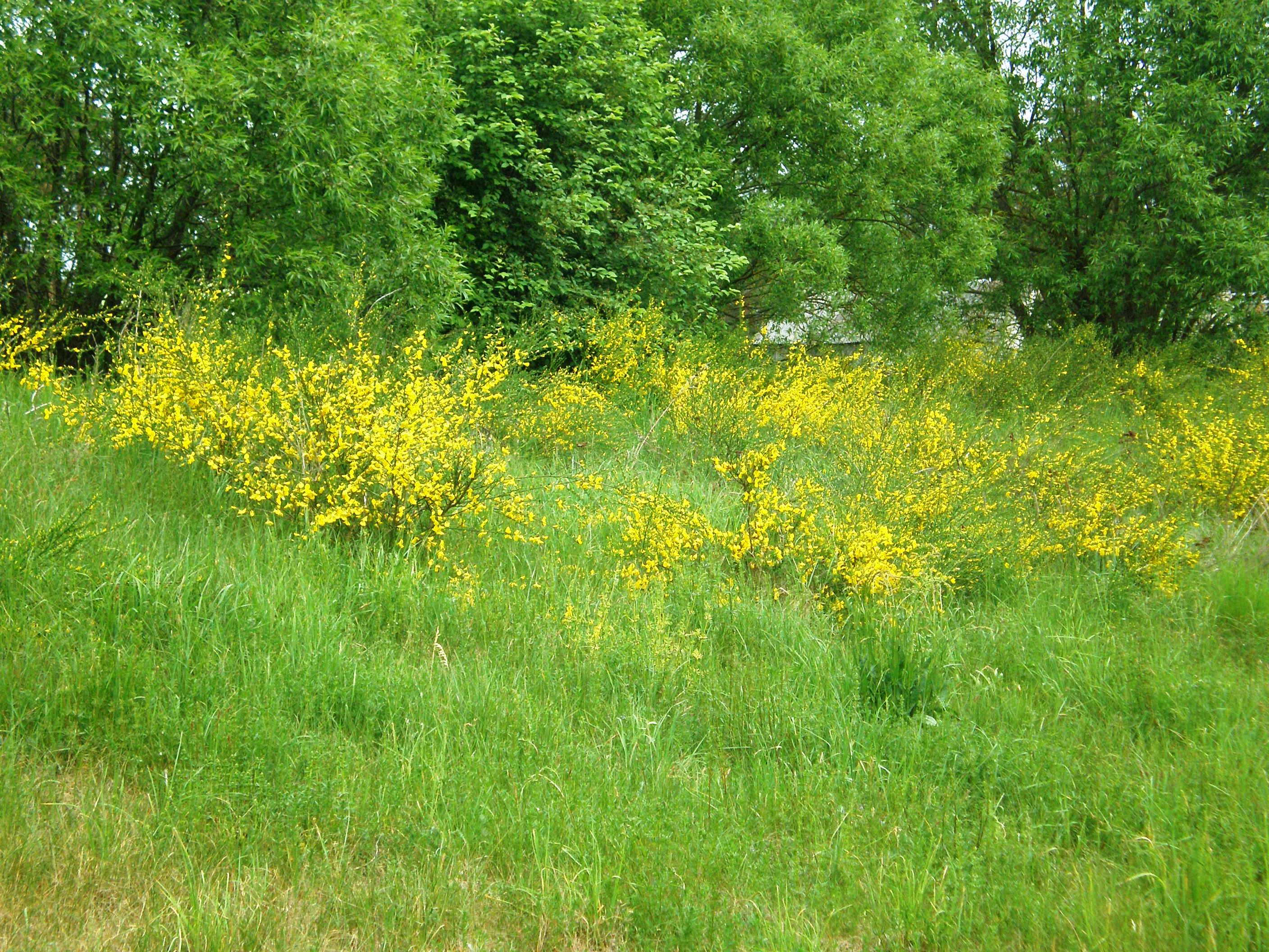 Cytisus scoparius